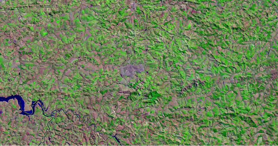 Imagem da Embrapa da região do município de Três Pontas. A mancha cinza ao centro é a cidade, enquanto a região montanhosa abaixo e à direita da cidade é a serra de três Pontas.